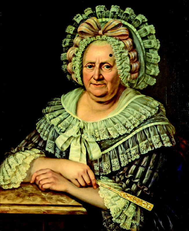 71 years old Josepha depicts probably a Lentigo maligna melanoma, Lentigo maligna